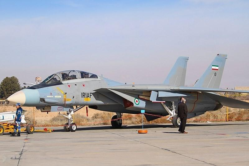 نمایشگاه نیروهوایی ارتش جمهوری اسلامی ایران در اصفهان